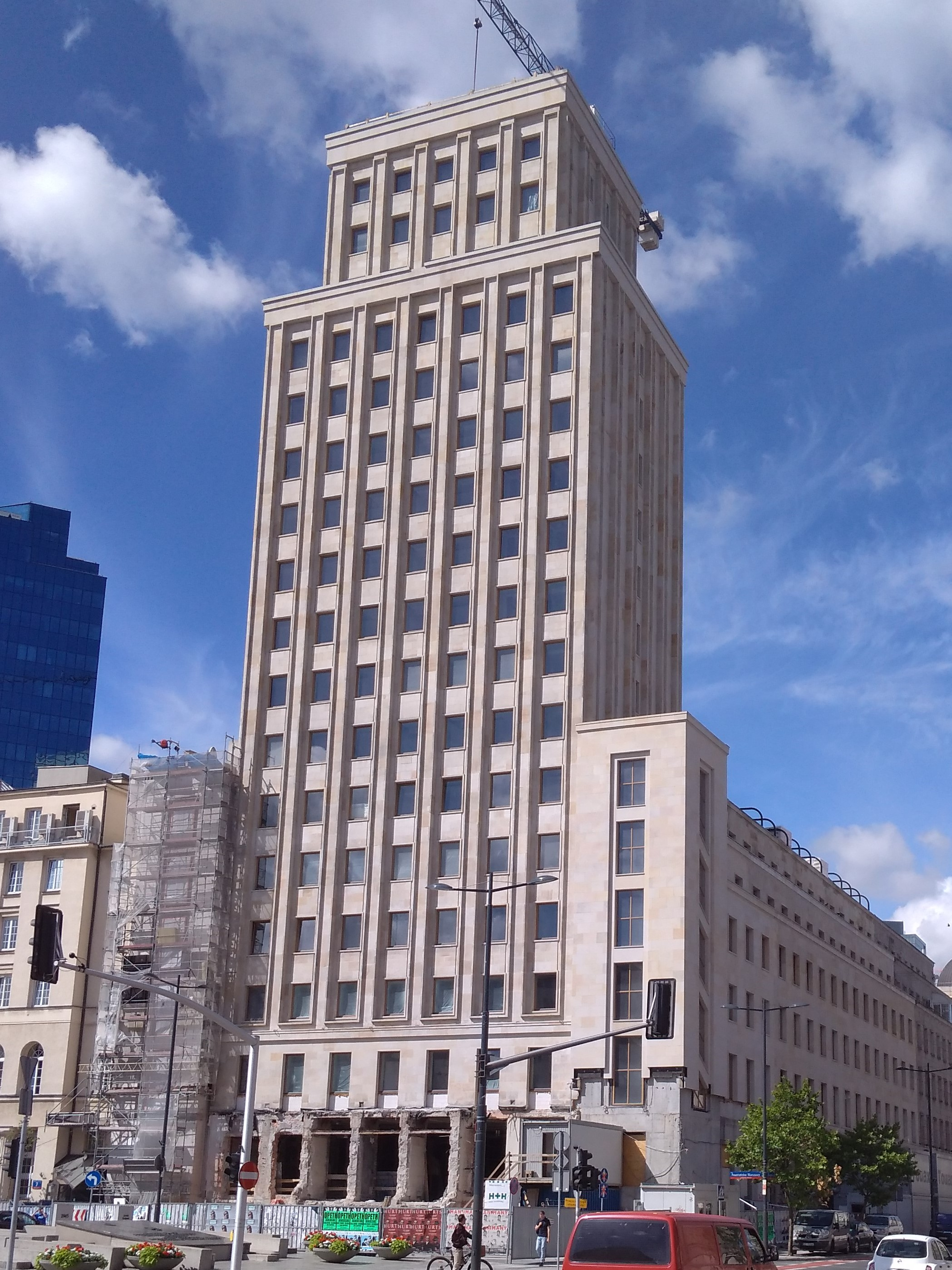 Prudential w remoncie (lipiec 2017)